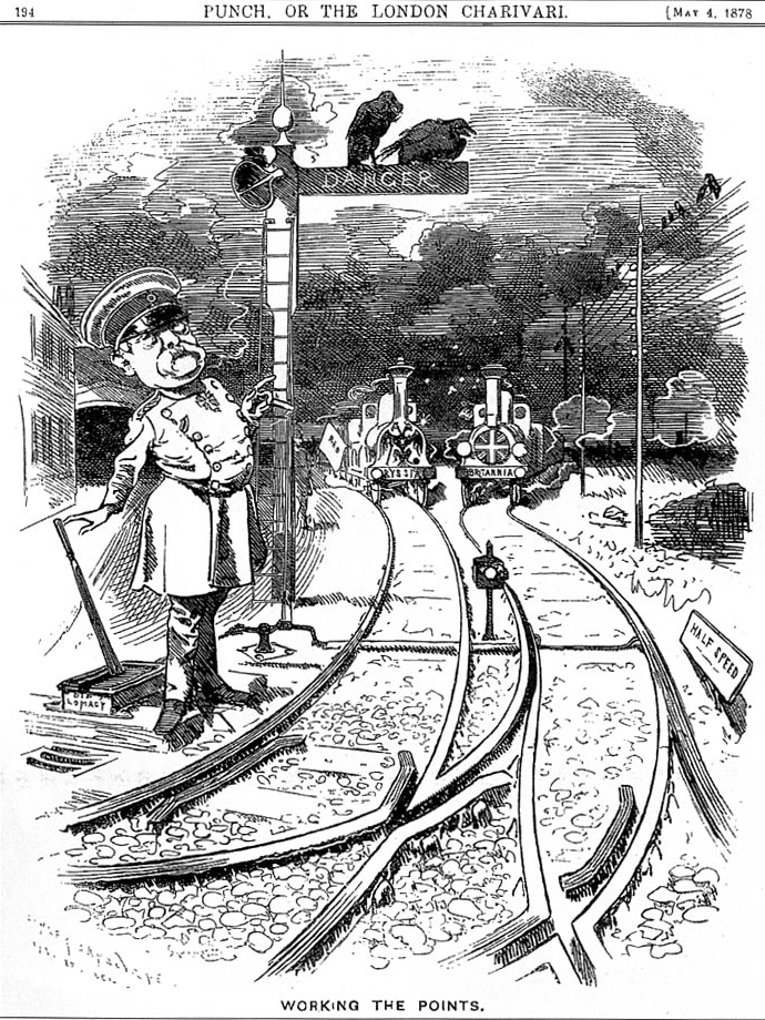 Bismarck als Weichensteller, Karikatur der Zeitschrift Punch 1878.